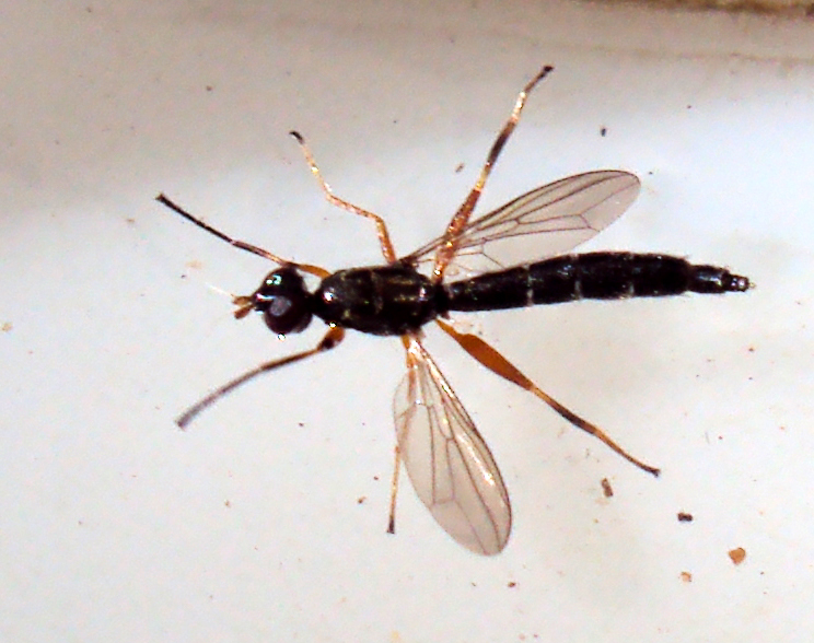 Hmyz z Podkomorských lesů, Česká republika jižní Morava